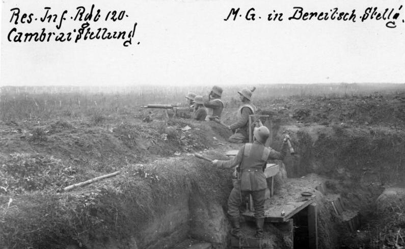 Res. Inf. Rgt. 120 Cambraistellung, M.G. in Bereitsch. Stellg.